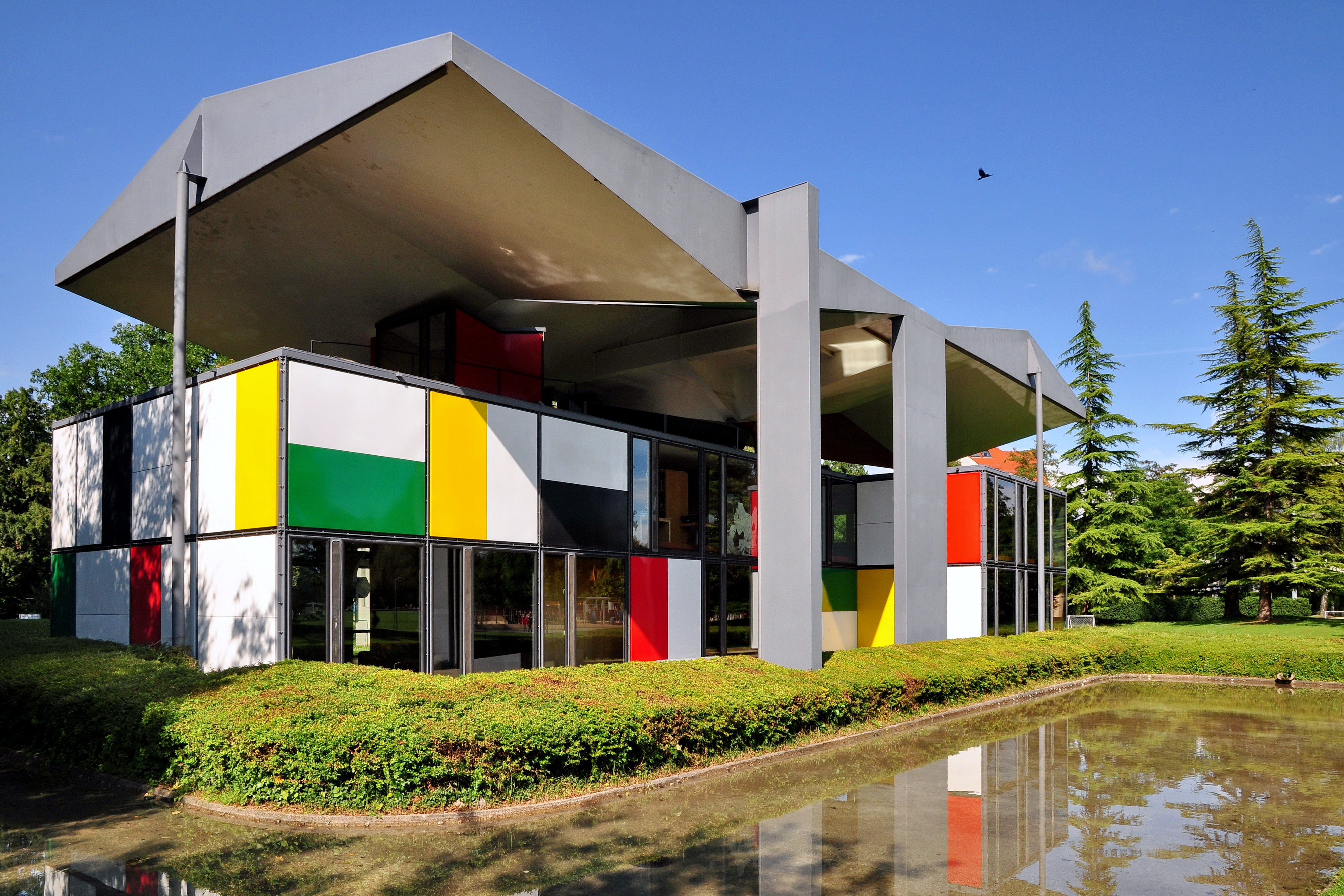 Centre Le Corbusier (Heidi Weber Museum) in Zürich-Seefeld (Switzerland)